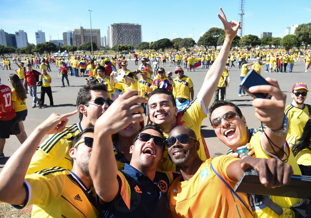 Colombianos são maioria da torcida no Mané Garrincha